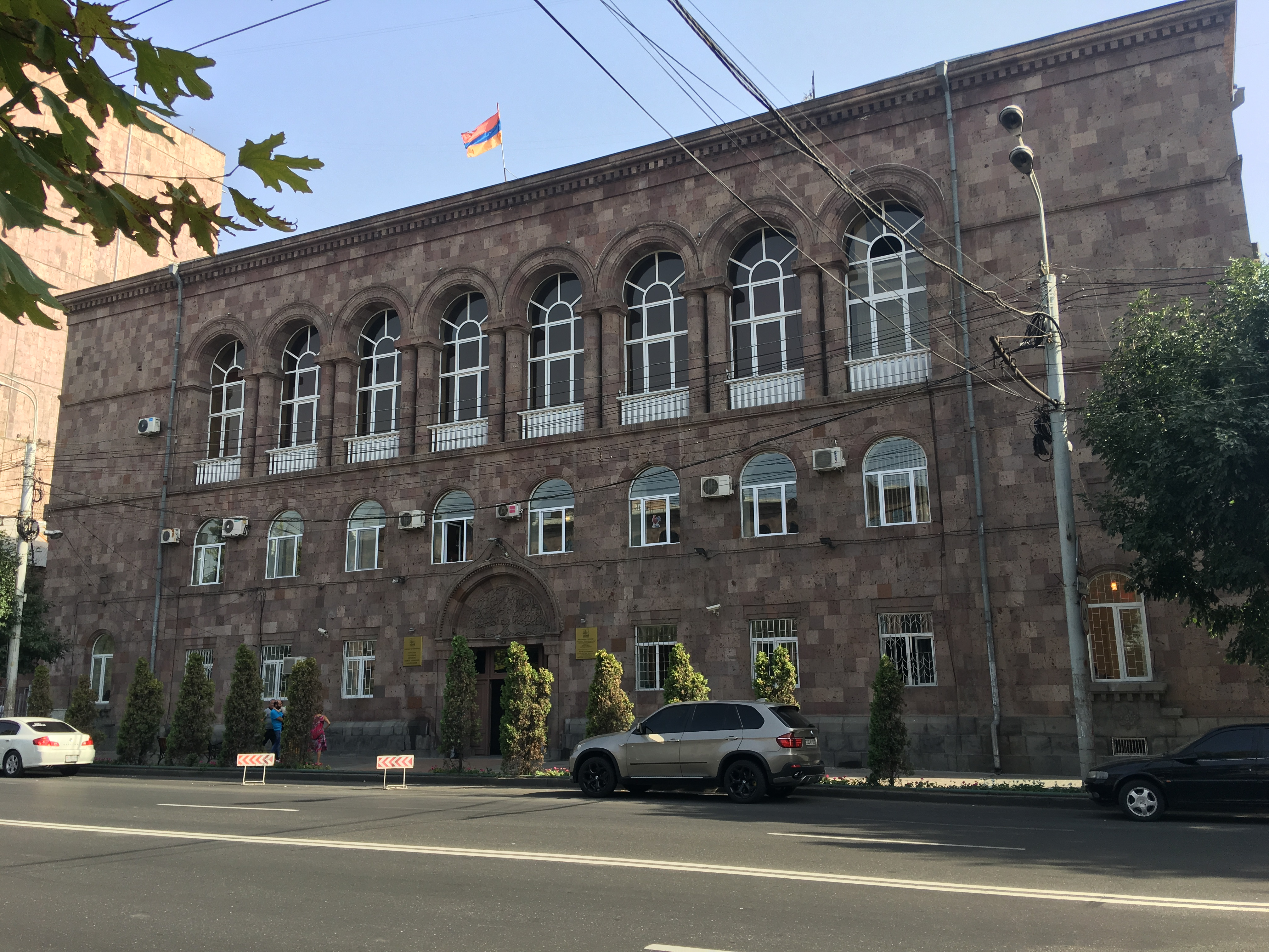 Շենգավիթ վարչական շրջանի համայնքապետարանի շենքը